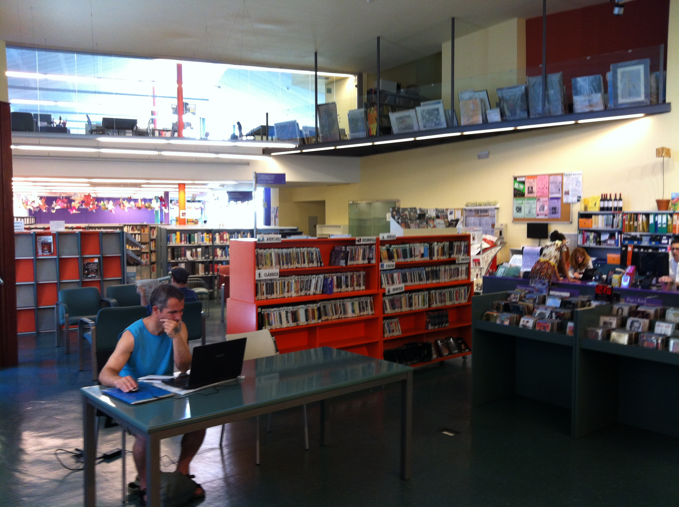 Biblioteca de Palafrugell- Taller Viquièdia juny 2012